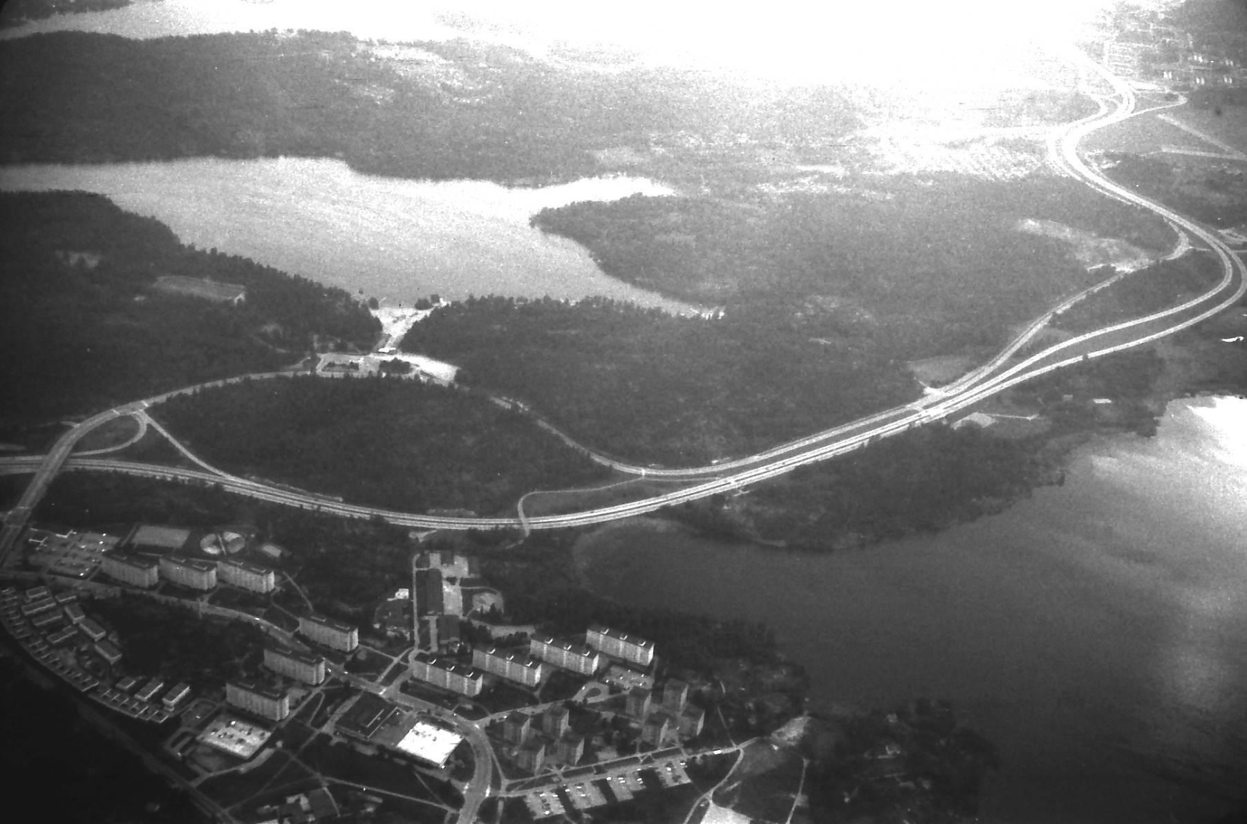 Flatenområdet från luften med sjön Flaten till vänster (med Flatenbadet) och Ältasjön längs ner till höger